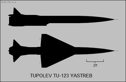 Tupolev Tu-123 3D